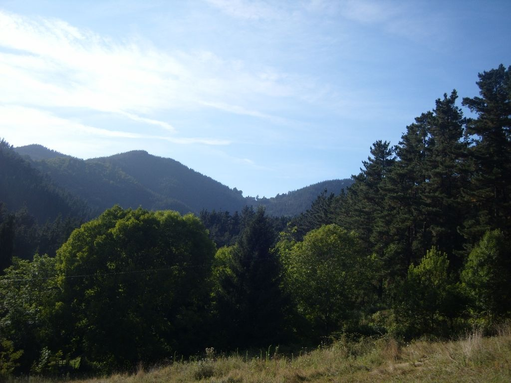 mendiak